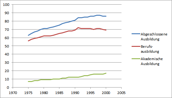 Akademikerquote in Deutschland von 1975 bis 2000